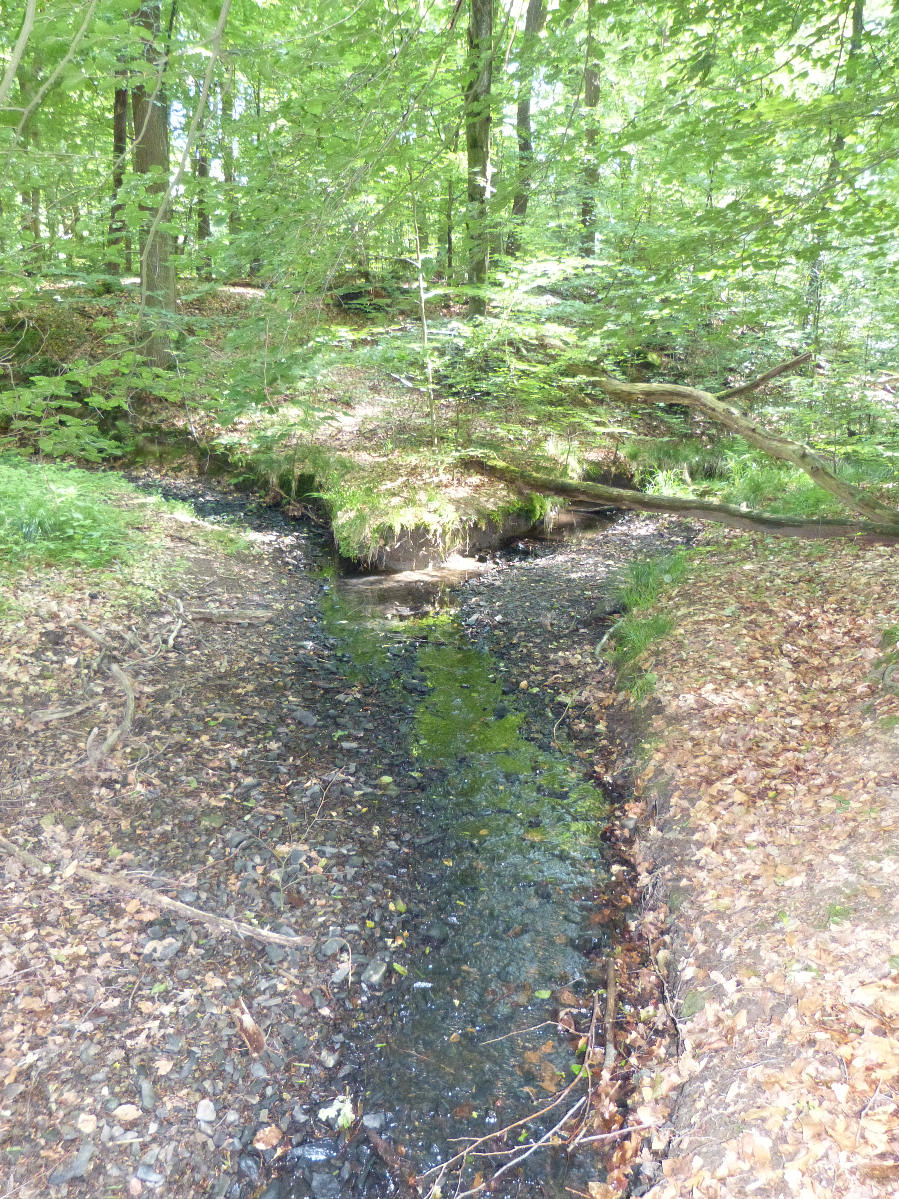 Vereinigung der zwei Quellbächer des Beverbachs (Wur) im Aachener Wald, Dornbruchweg/Büfferwg